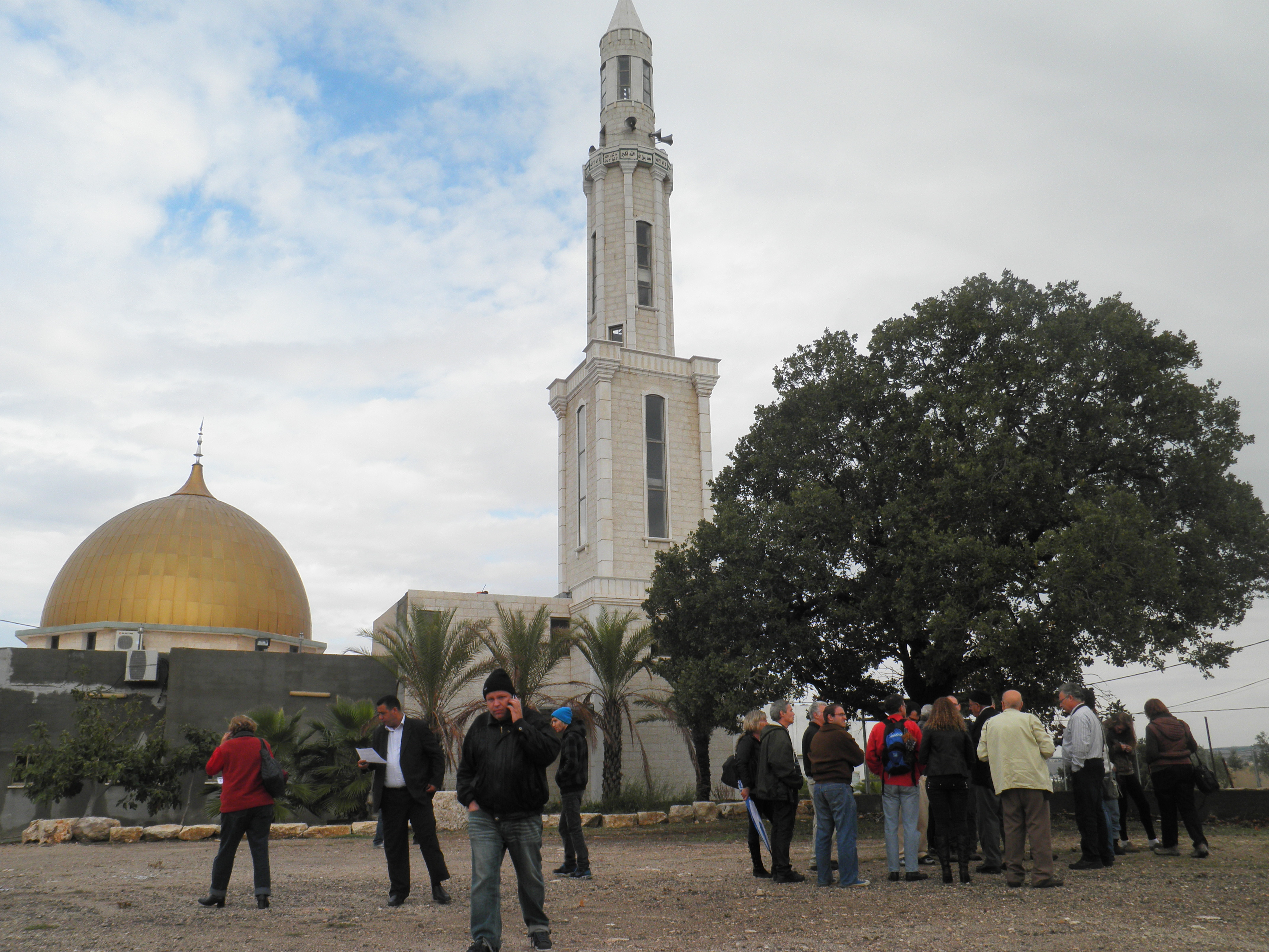 כפר קרע